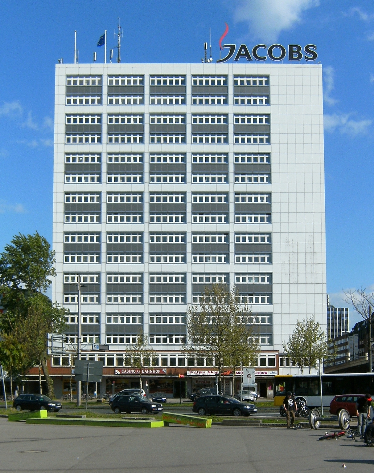 Tivoli-Hochhaus am Bahnhofsplatz in Bremen